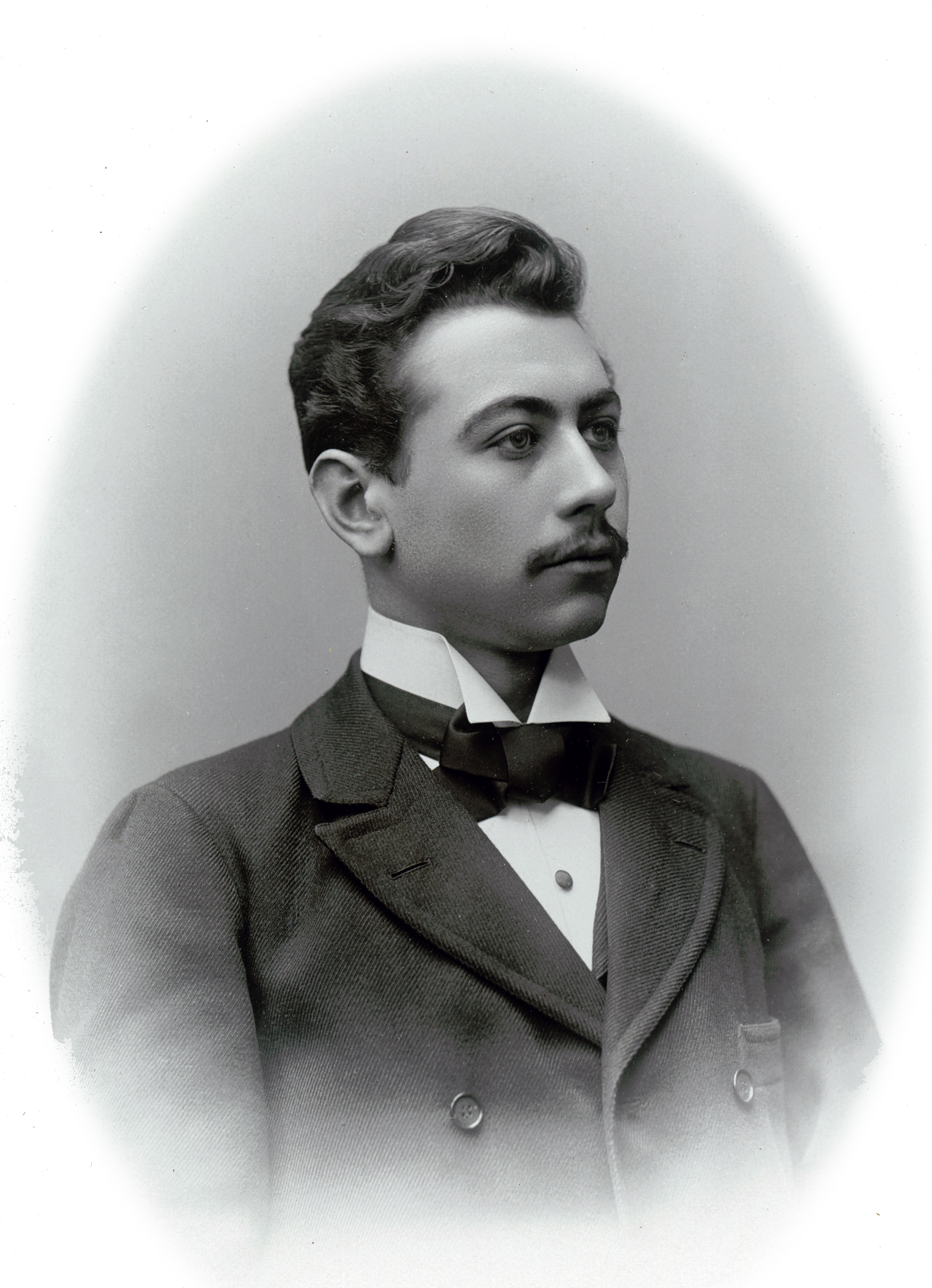 John Hertz, skådespelare vid William Engelbrechts sällskap 1894 Född John Emil Jönsson (1875-1952)